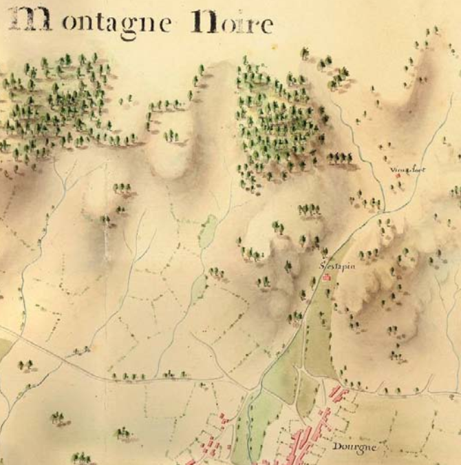 Détail d'une carte du village de Dourgne au XVIIIe siècle